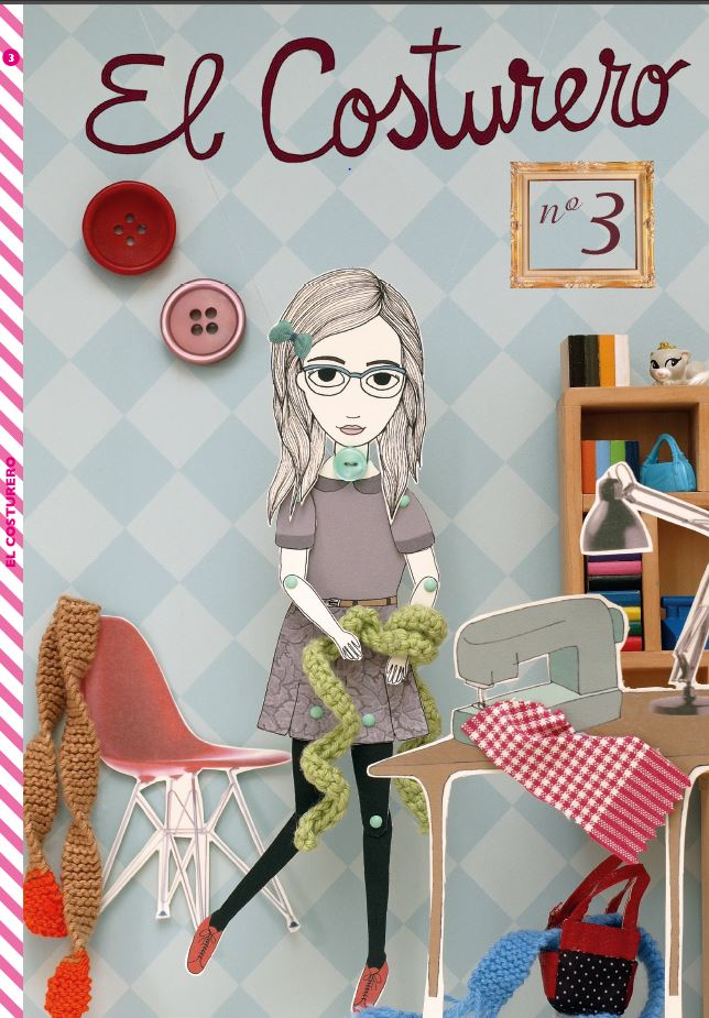 Portada de la Edición 3 del Costurero